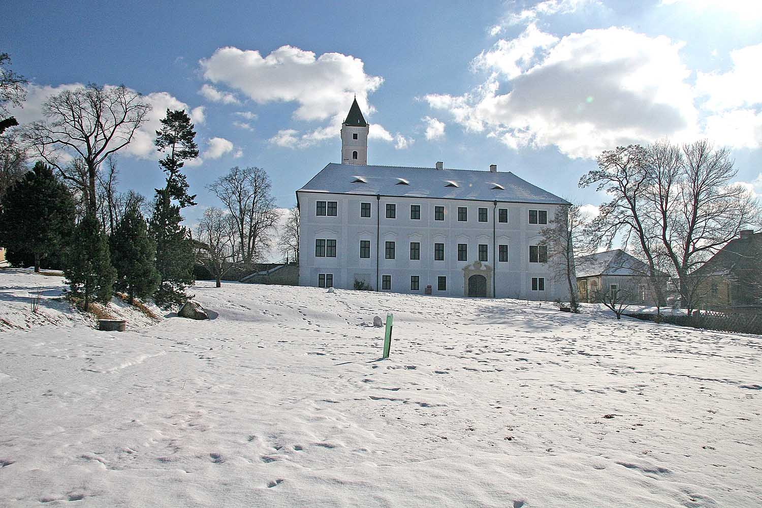 Zámek v Zásmukách autor: Prazak Date: 27. 2. 2006